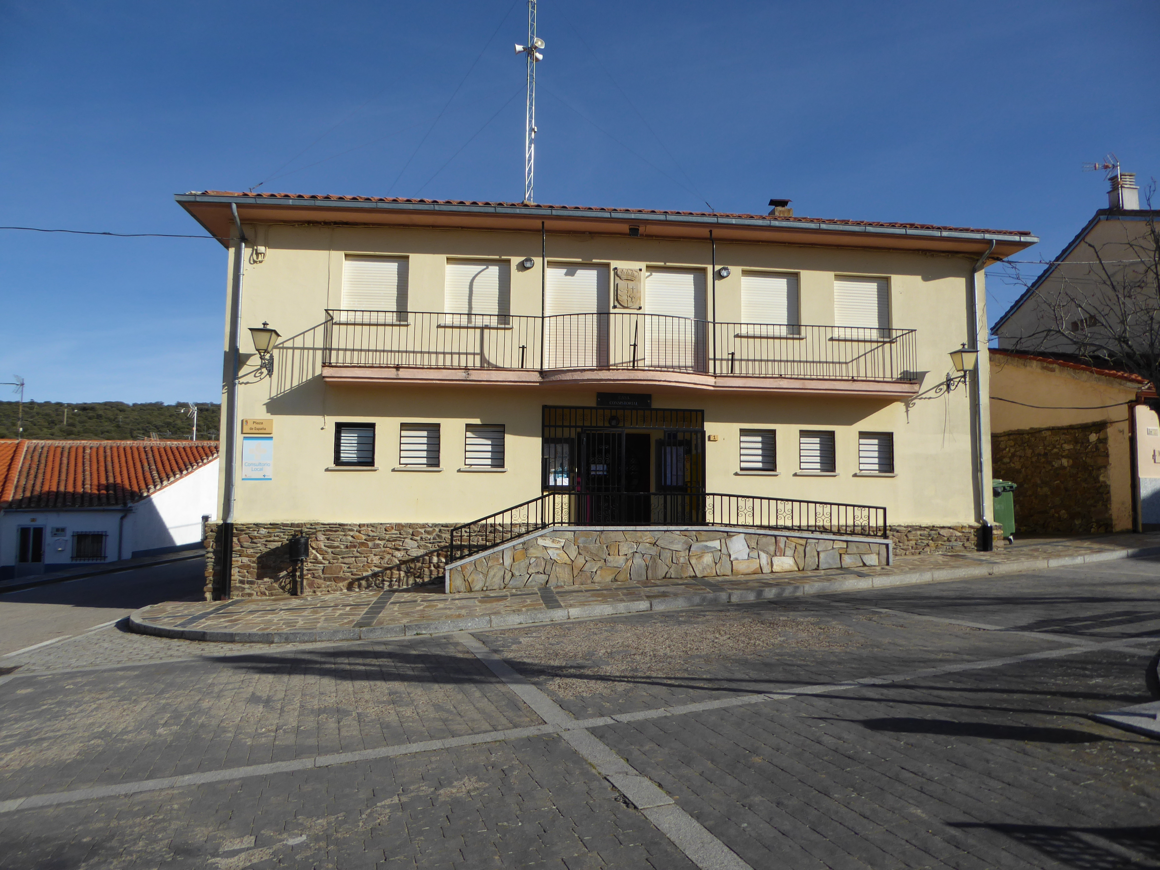 Ayuntamiento de Las Veguillas en la provincia de Salamanca, situado en la plaza de España, población fundada en el siglo XIV